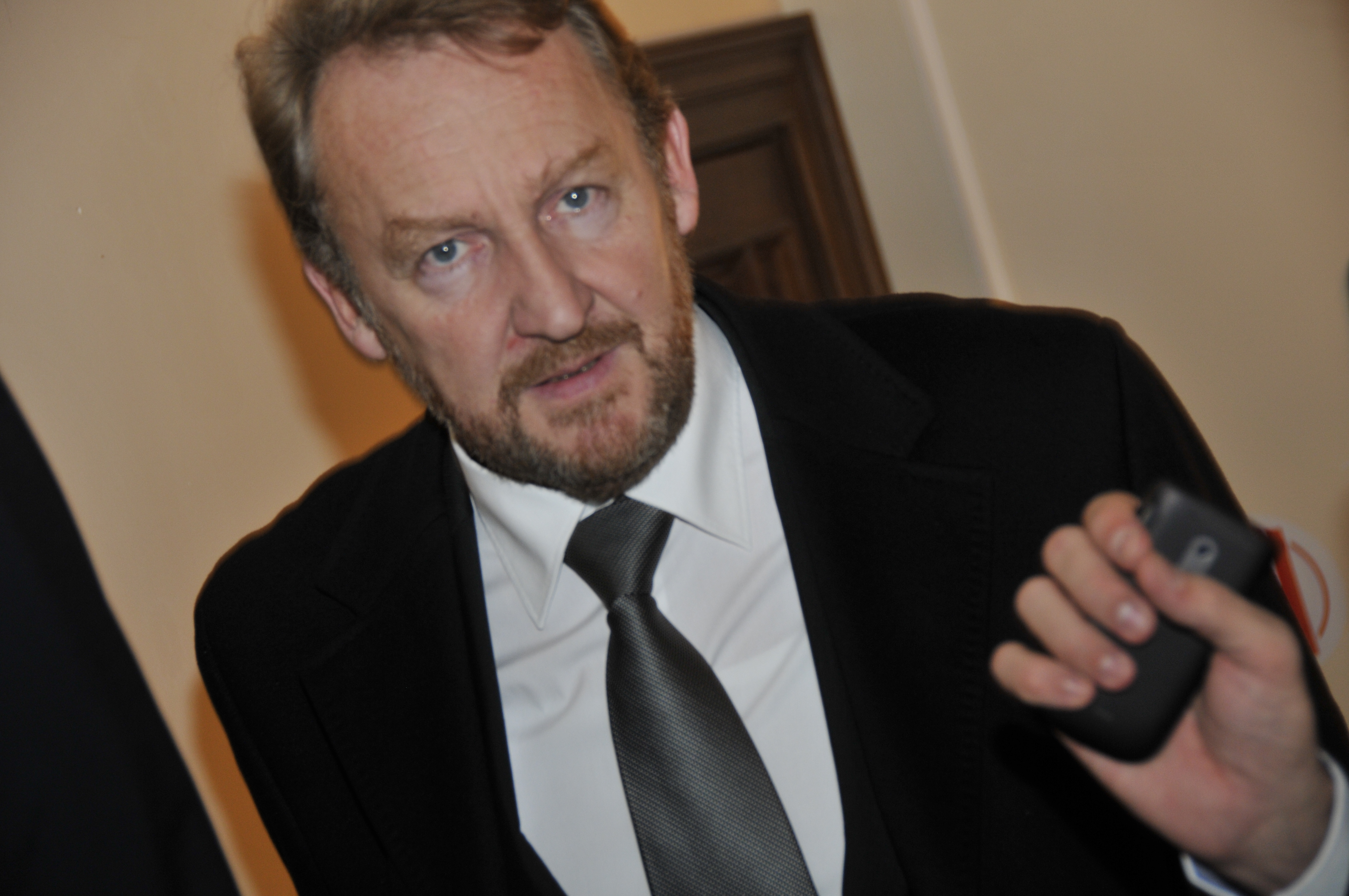 EPP Summit December 2010